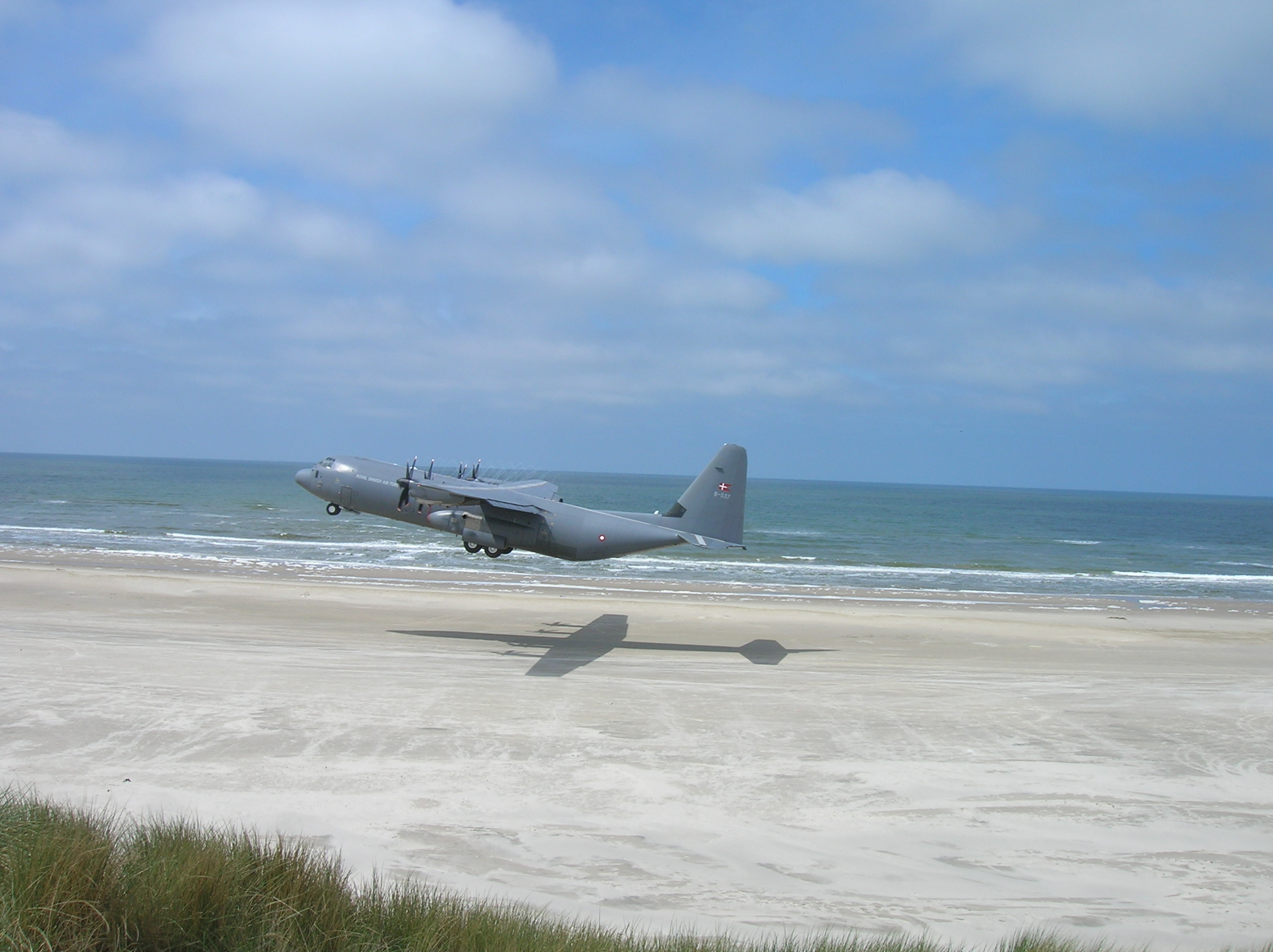 Startende Lockheed C-130 der Dänischen Luftstreitkräfte auf Vejers Strand